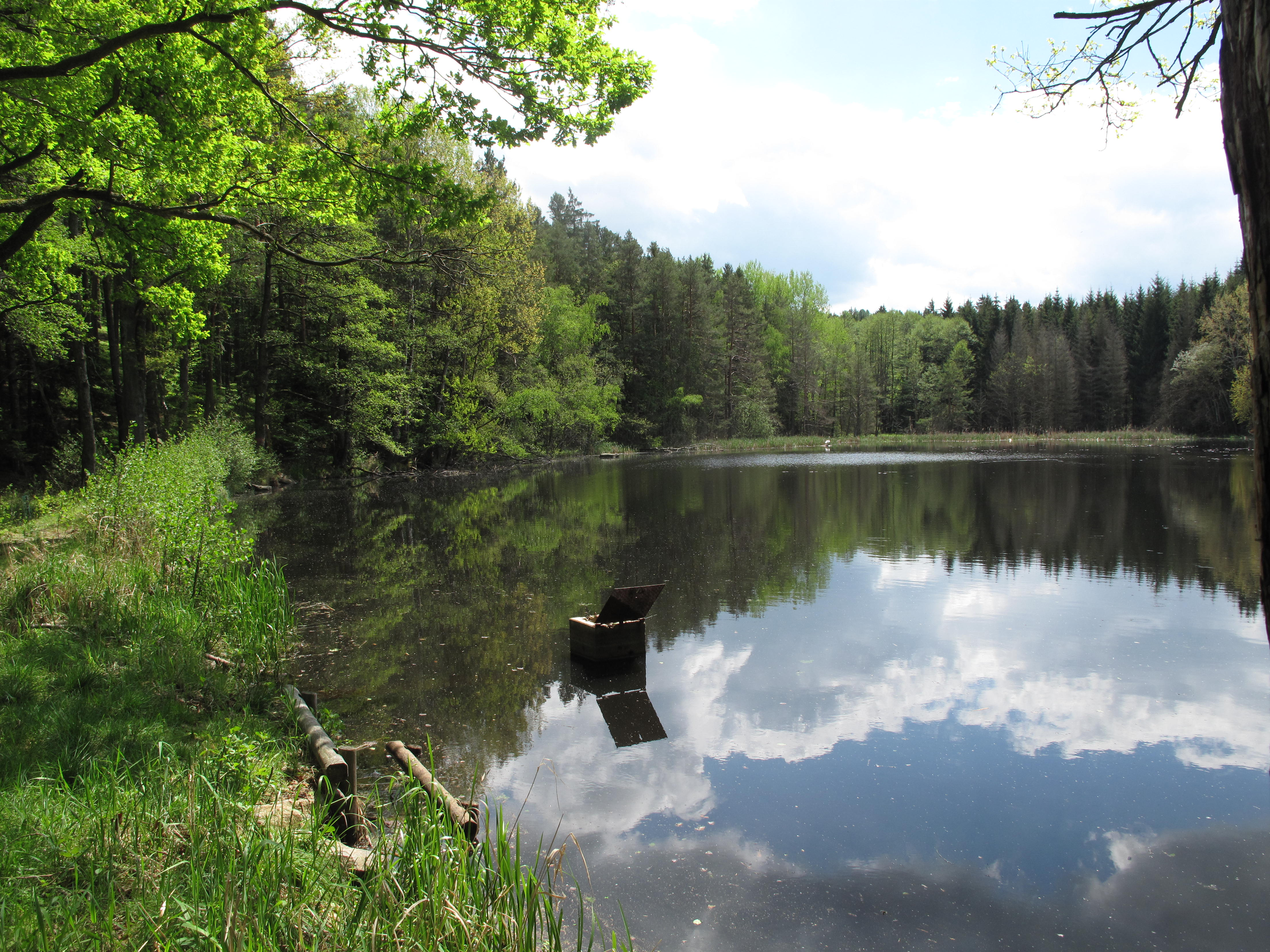 Česky: Přírodní památka Přesličkový rybník, samotný Přesličkový rybník